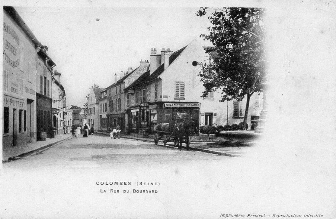 Colombes.Rue du Bournard.Perspective